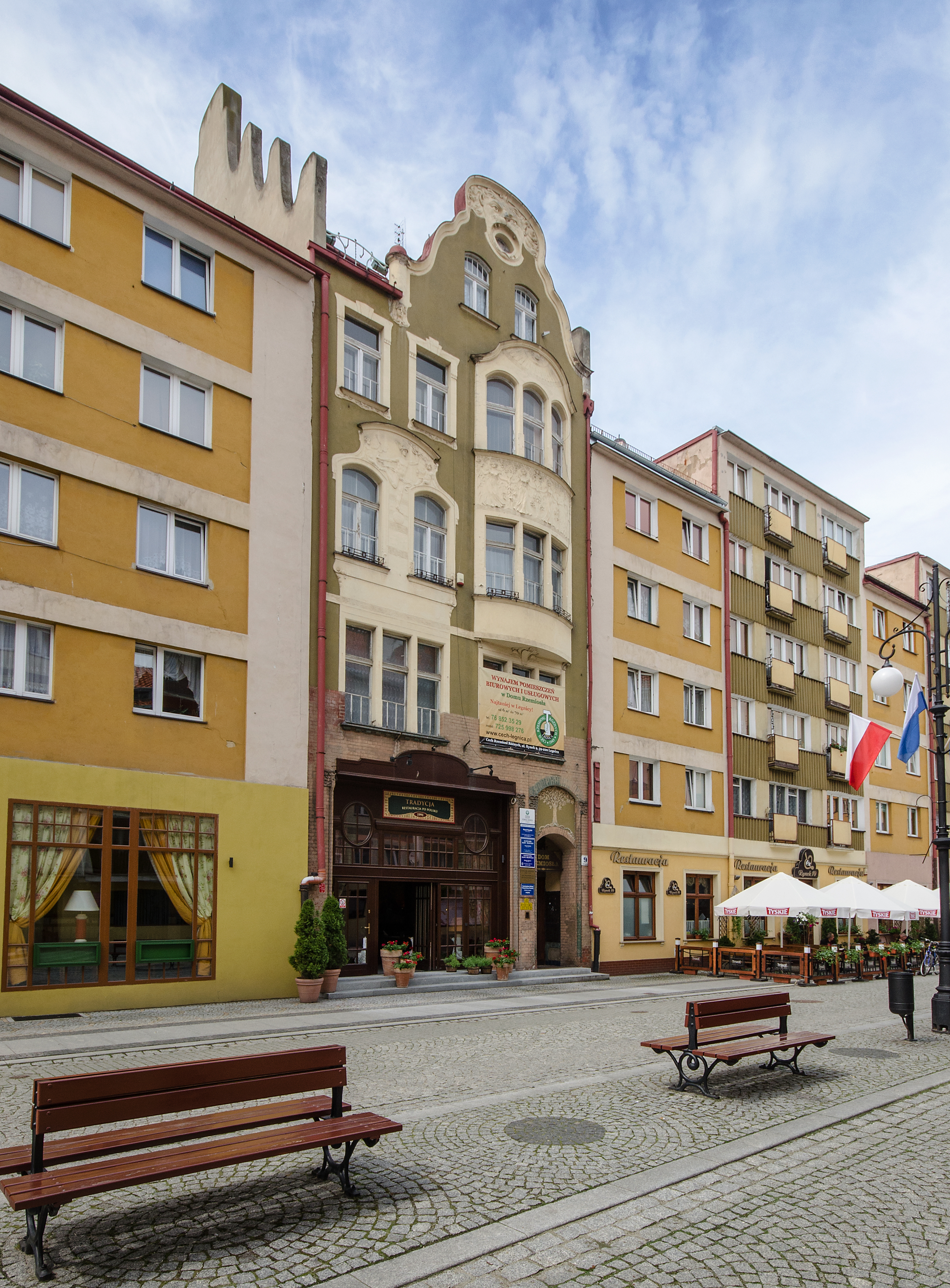 Legnica, dom, 1905